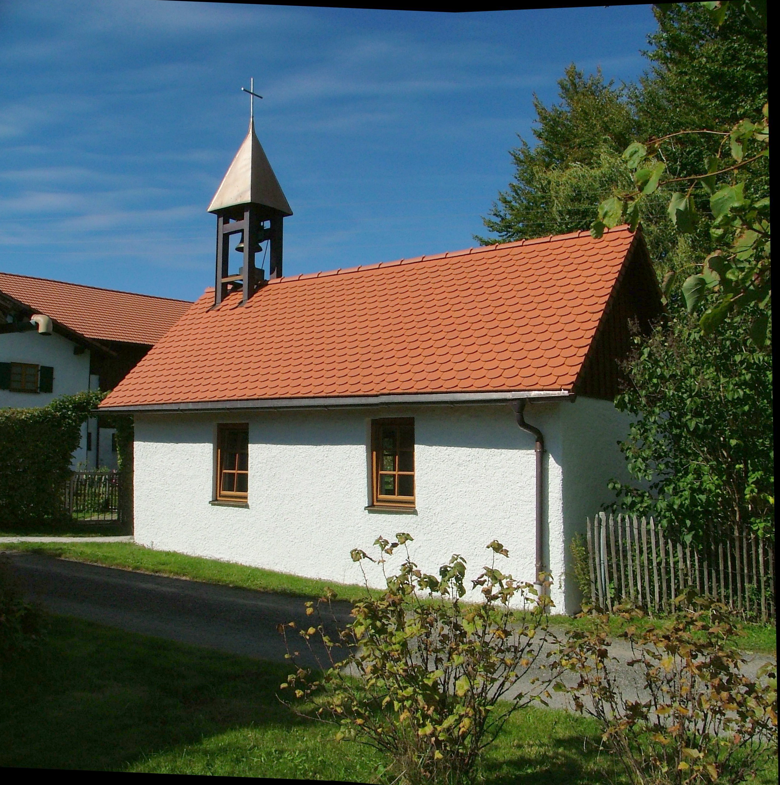 Dezion